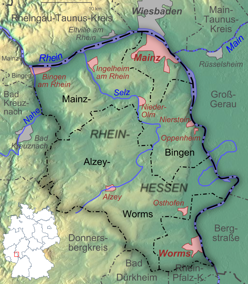 Relief und Topographie von Rheinhessen